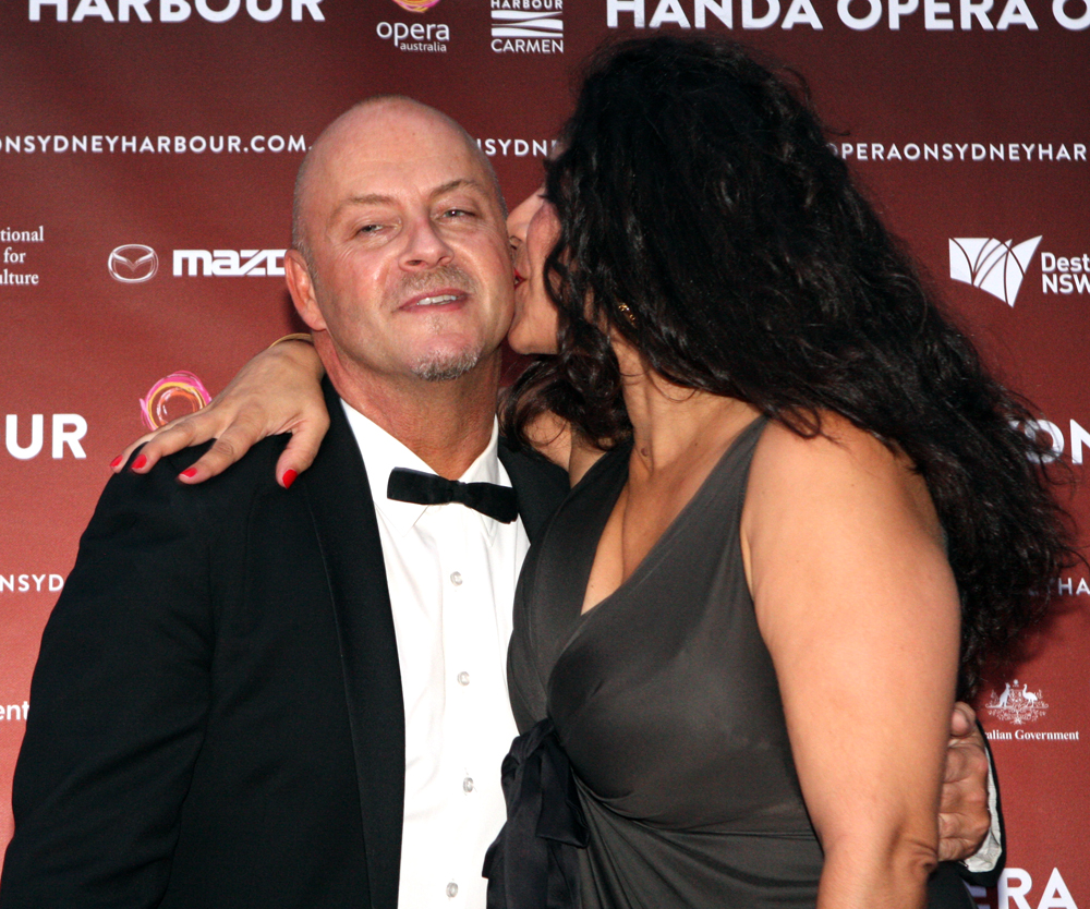 Peter Morrissey gets a kiss